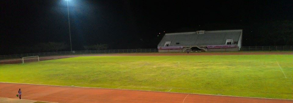 Mae Fah Luang University Stadion